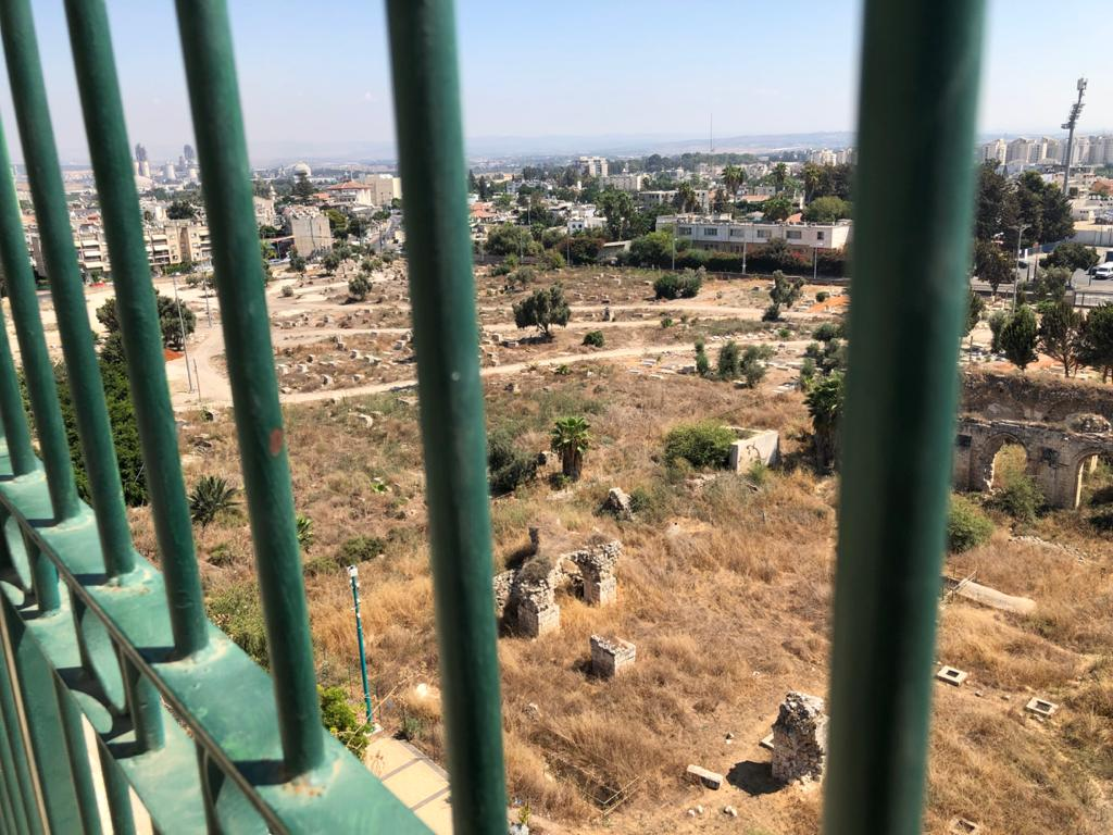 مطل الجامع الابيض